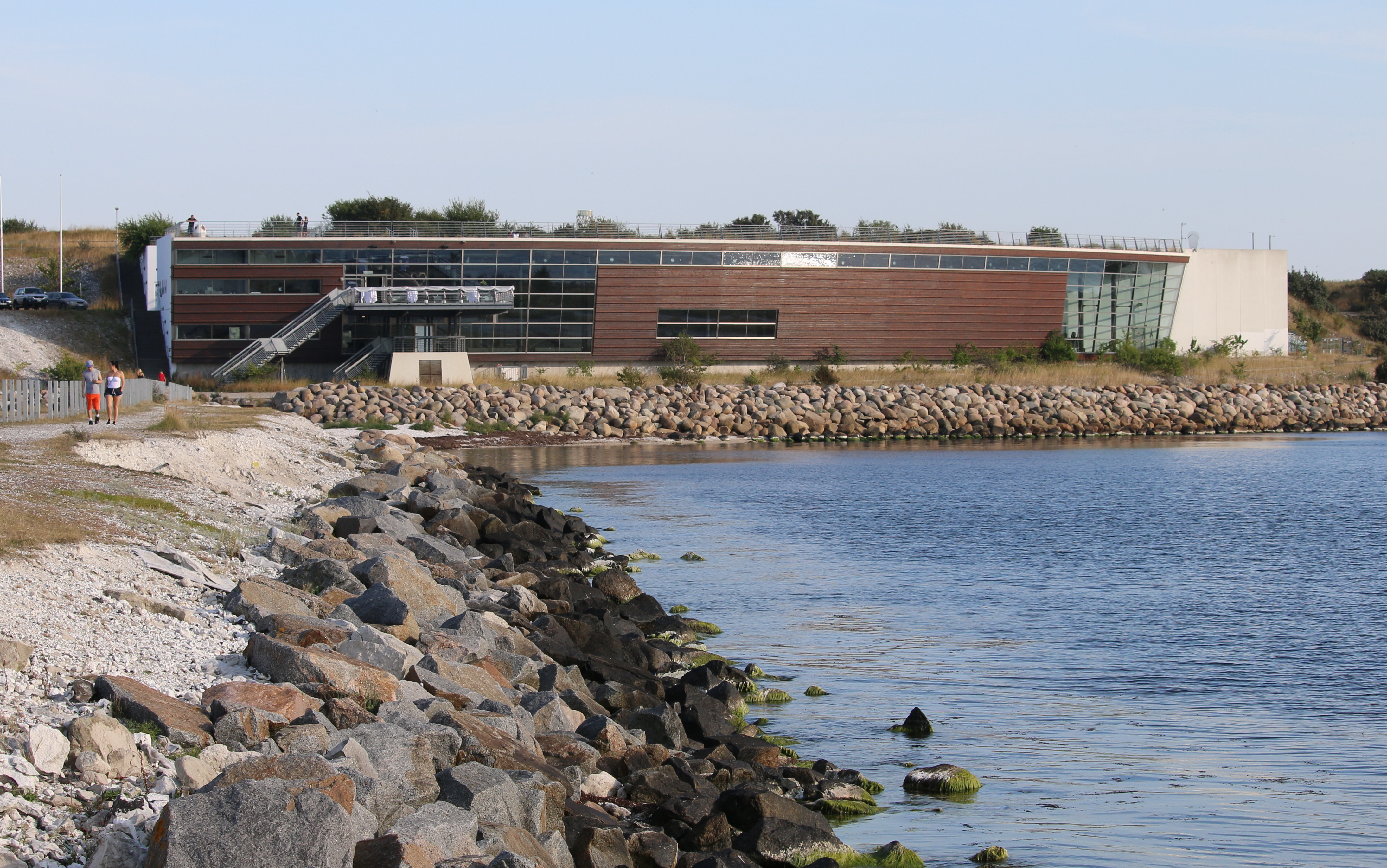 Utsikten, Malmö, augusti 2015